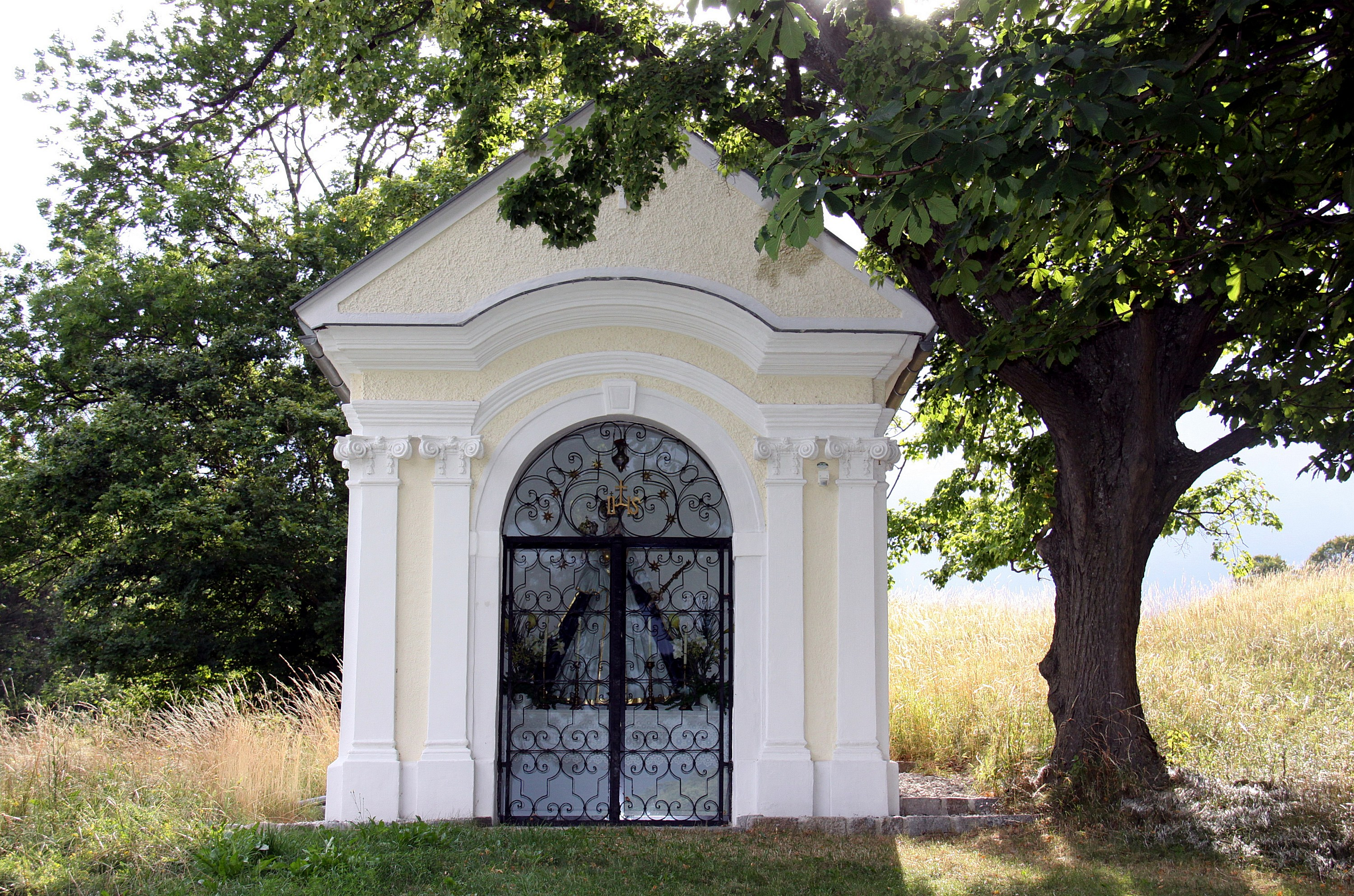 Denkmalgeschützte Marienkapelle in Höflein an der Hohen Wand Object location47° 47′ 32.64″ N, 16° 02′ 16.3″ E